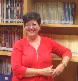 Immaculada Cerdà, acadèmica de l'AVL